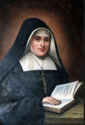 Bienheureuse Placide Viel